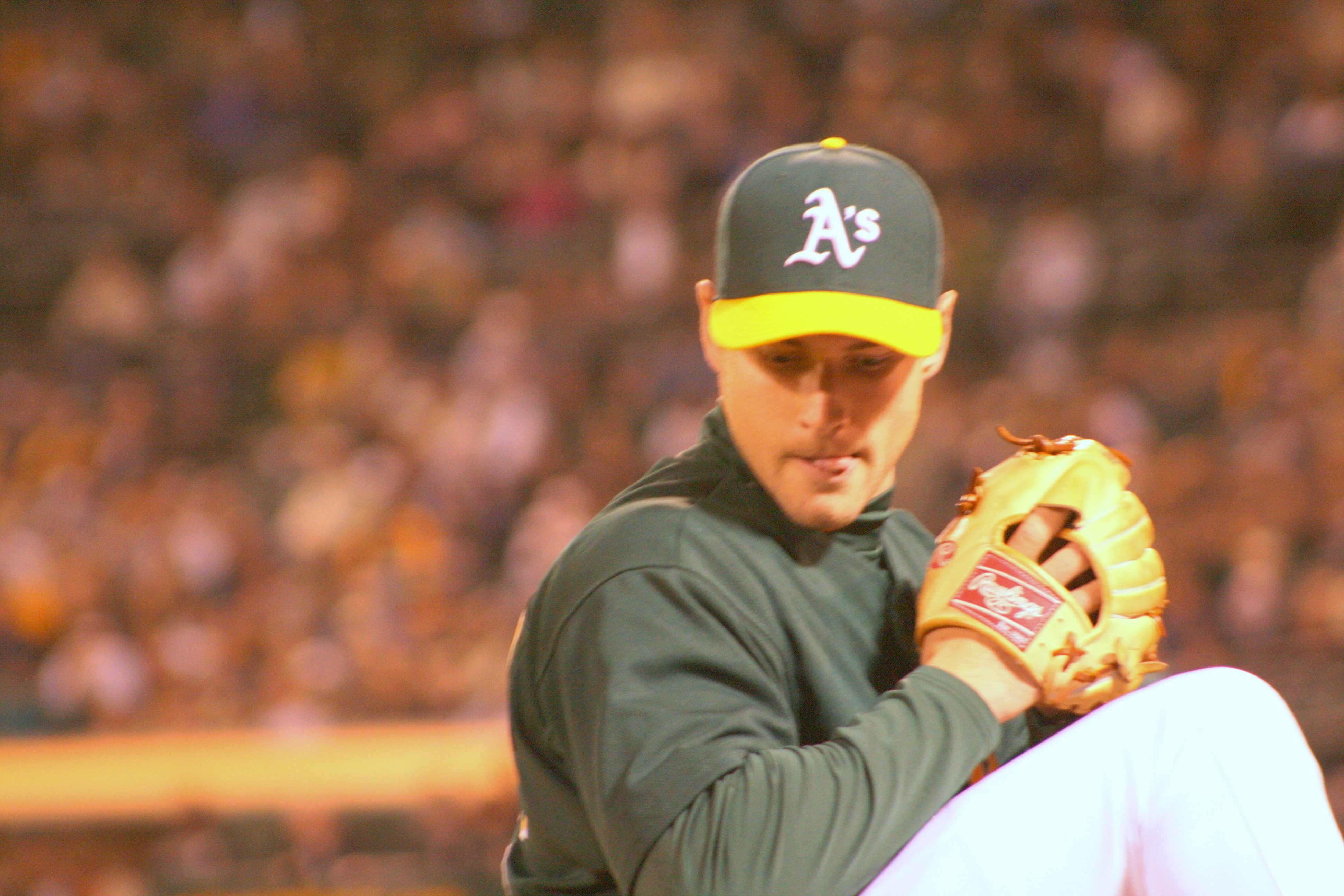 Jay Marshall